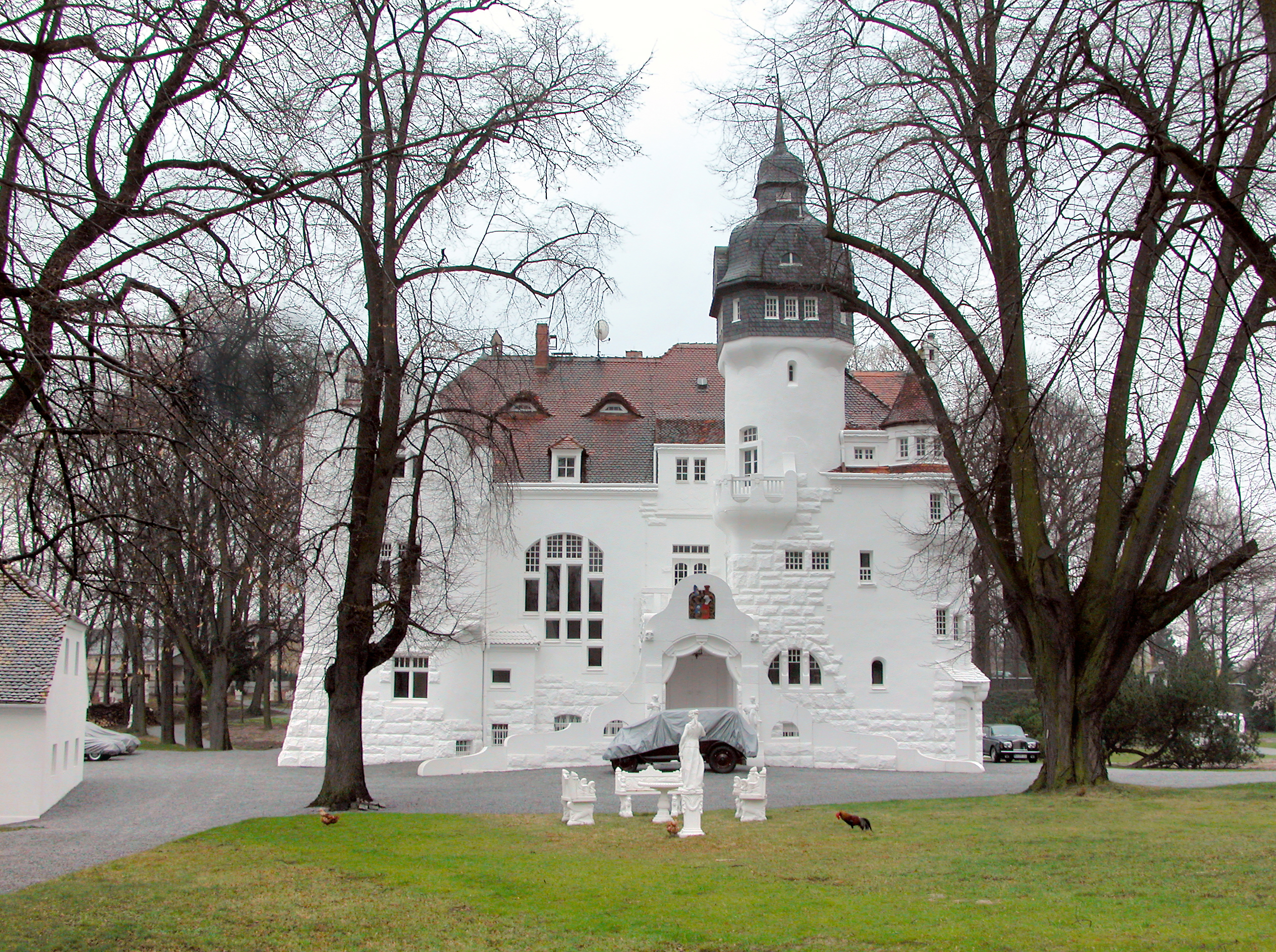 16.03.2008 01920 Elstra, Lessinggasse 7: Das neue Schloß (GMP: 51.220874,14.135745) wurde 1903 errichtet, nachdem das alte Gebäude 1902 abgebrannt war. Die Pläne hatte das Dresdner Architekturbüro Lossow & Viehweger gefertigt. In der DDR wurde das villenartige Schloß als Krankenhaus genutzt, das 1990 geschlossen wurde. Seit 1996 Privatbesitz. Sicht von Nordwesten. [DSCN31912.TIF]20080316105DR.JPG(c)Blobelt